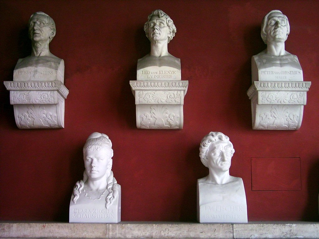 Bust of Leo von Klenze (upper line, center) at Ruhmeshalle (Hall of fame), München, Germany. Picture taken by myself: Dominik Hundhammer, München, 27 March 2006.